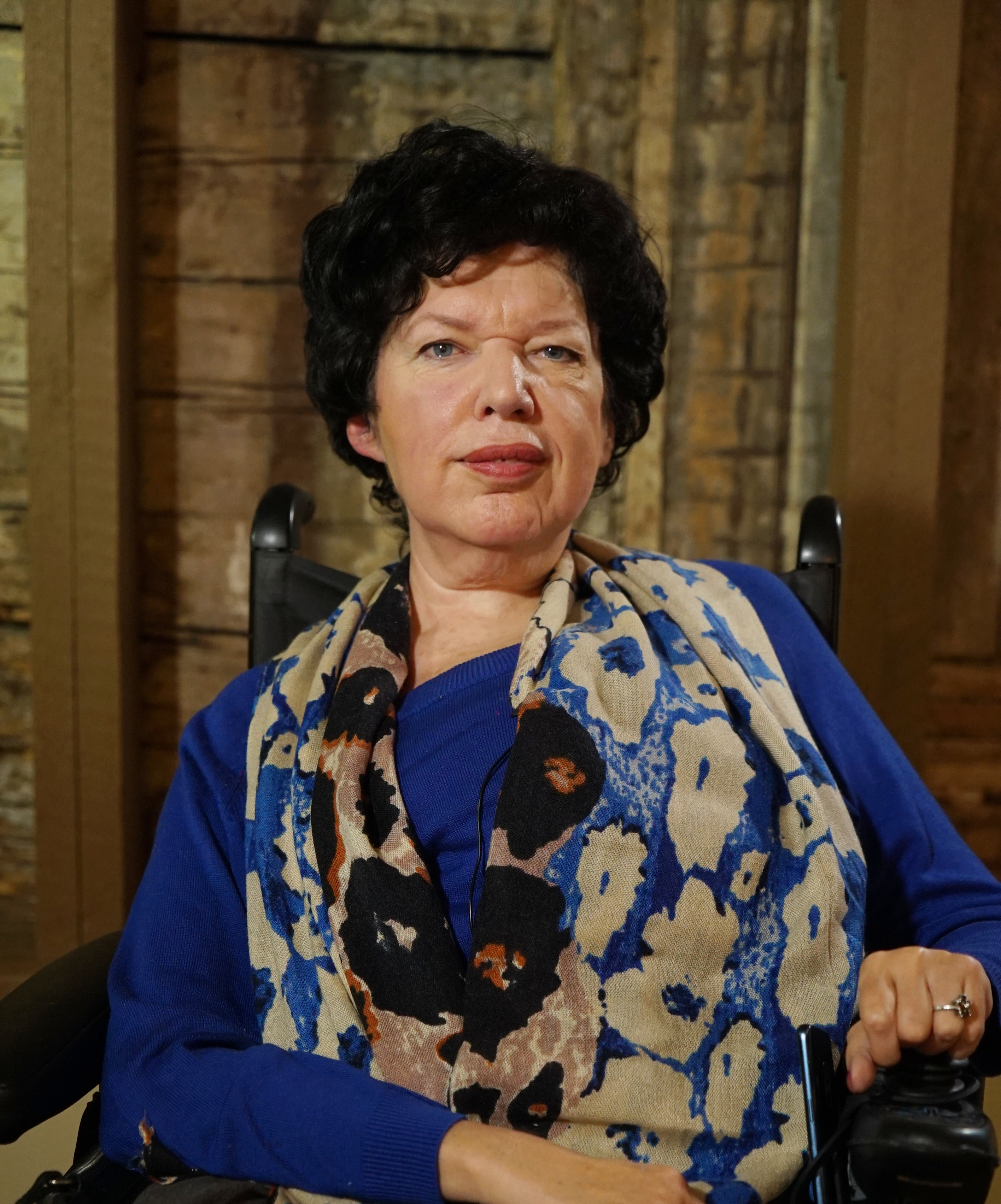 Gunta Anča